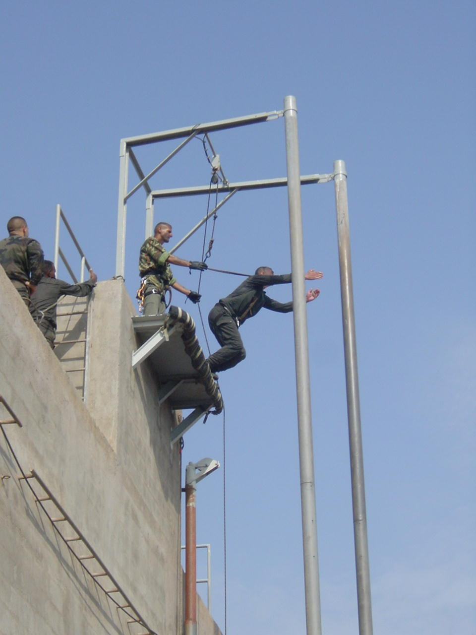 Photo de l'asperge sur le bloc d'escalade du CECAP à Djibouti